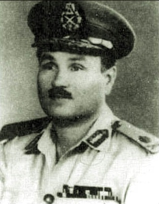 صورة اللواء سعد مأمون